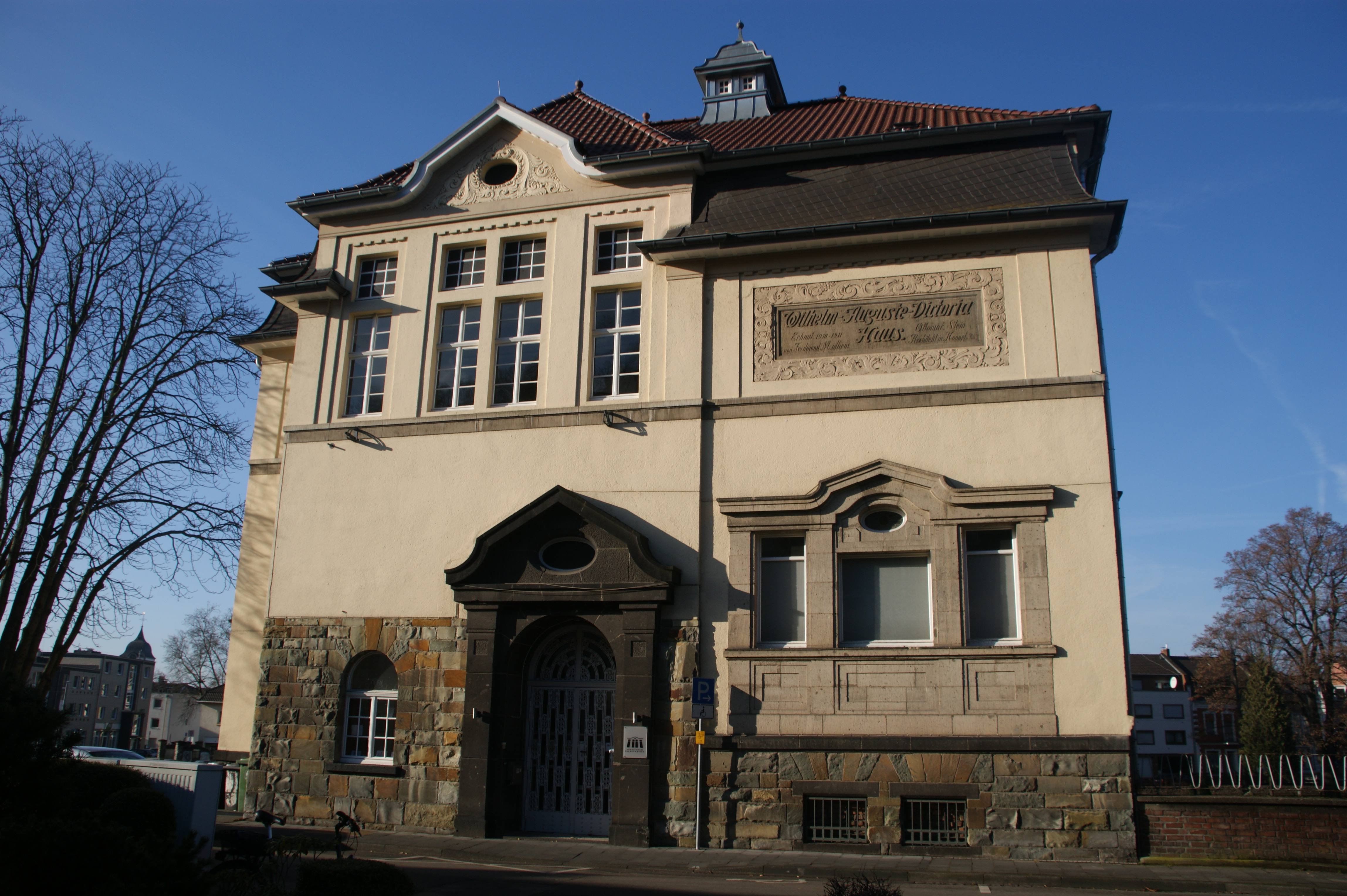 Wilhelm-Auguste-Viktoria-Haus („Palastweiher“) in Königswinter Inschrift: Wilhelm-Auguste-Victoria-Haus. Erbaut 1910–1911 von Ferdinand Mülhens. Ottomar Stein Architekt in Honnef